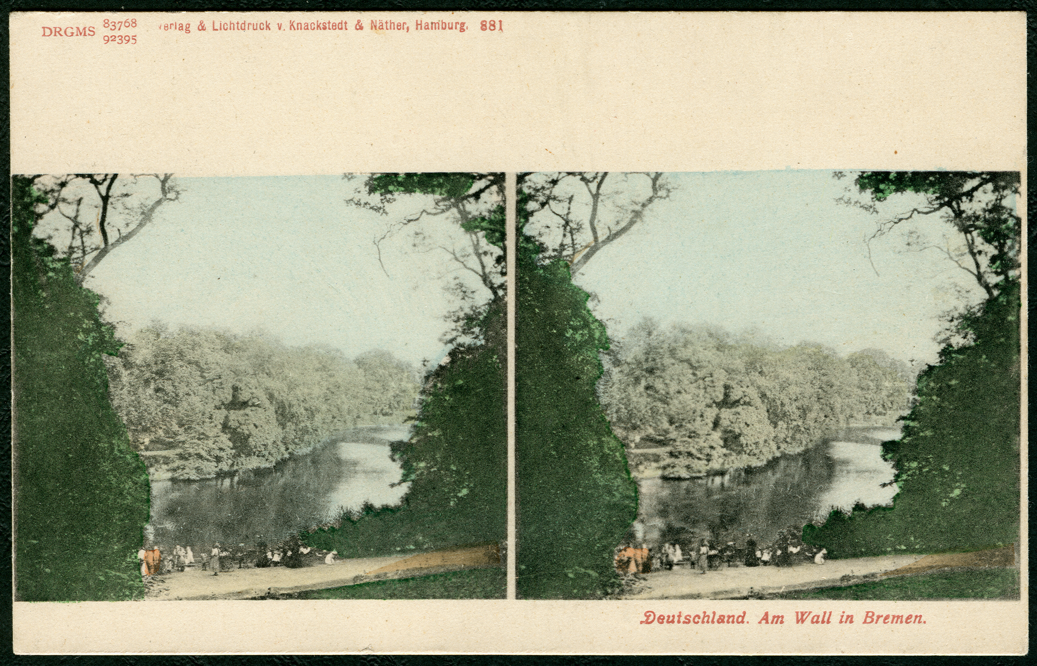 Handkolorierte Stereoskopie der Firma Knackstedt & Näther mit der fortlaufenden Nummer 881, hier mit einem Blick über die zum öffentlichen Park umgewandelten Bremer Wallanlagen. Das auf Lichtdruck spezialisierte hamburger Unternehmen (auch: K & N) hatte für ihre stereographischen Ansichtskarten die DRGM-Nummern 83768 und 92395 eintragen lassen ... Diese Karte wurde dankenswerterweise von Ilse Paul zur Verfügung gestellt, um sie als Digitalisat über Wikimedia Commons nachhaltig allen Menschen zur Verfügung zu stellen ...